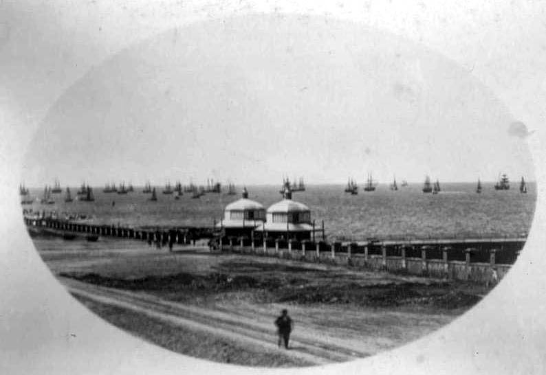 Imagen del Paseo de Julio, Buenos Aires, Argentina